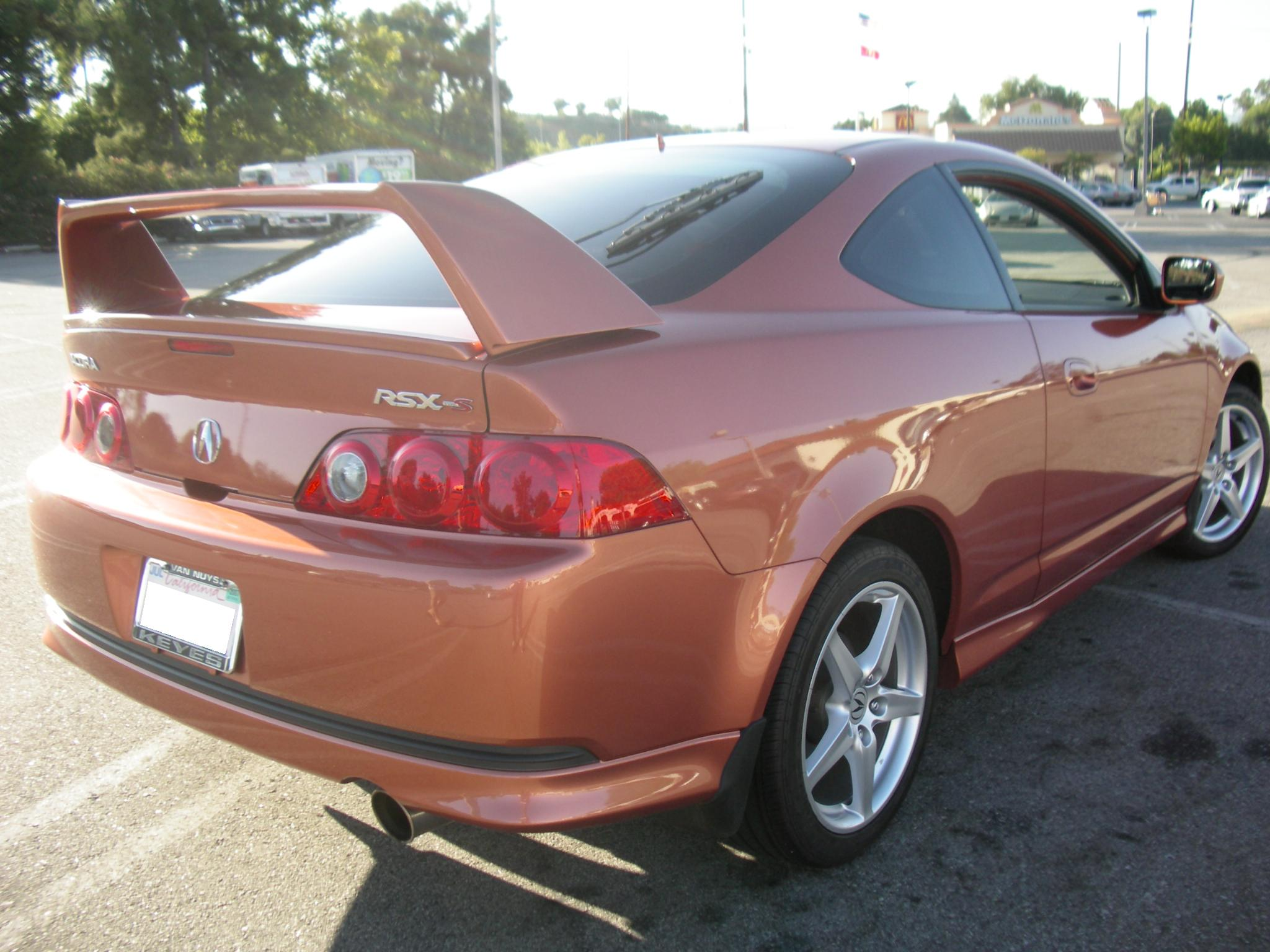 Acura RSX Type-S 2006Личное авто